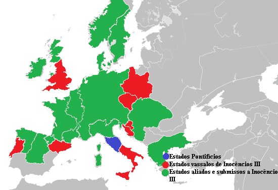 Descrição da Europa em 1216 e sua relação com o Papa Inocêncio III e a Santa Sé. A cor azul são os Estados Pontifícios, vermelha os estados vassalos, e verde os estados aliados de Inocêncio. Segundo Franzen, O papa era suserano e senhor feudal da Inglaterra, Portugal, Aragão, Dinamarca e Polônia, Boêmia, Hungria, Dalmácia e de vários outros pequenos territórios não identificados no mapa. (Franzen, August (1996). Breve História da Igreja. Lisboa: Presença. p. 236)